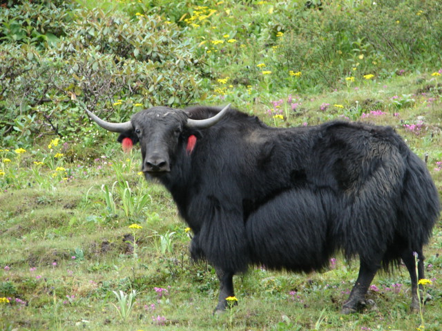 Yak animal in Sikkim India